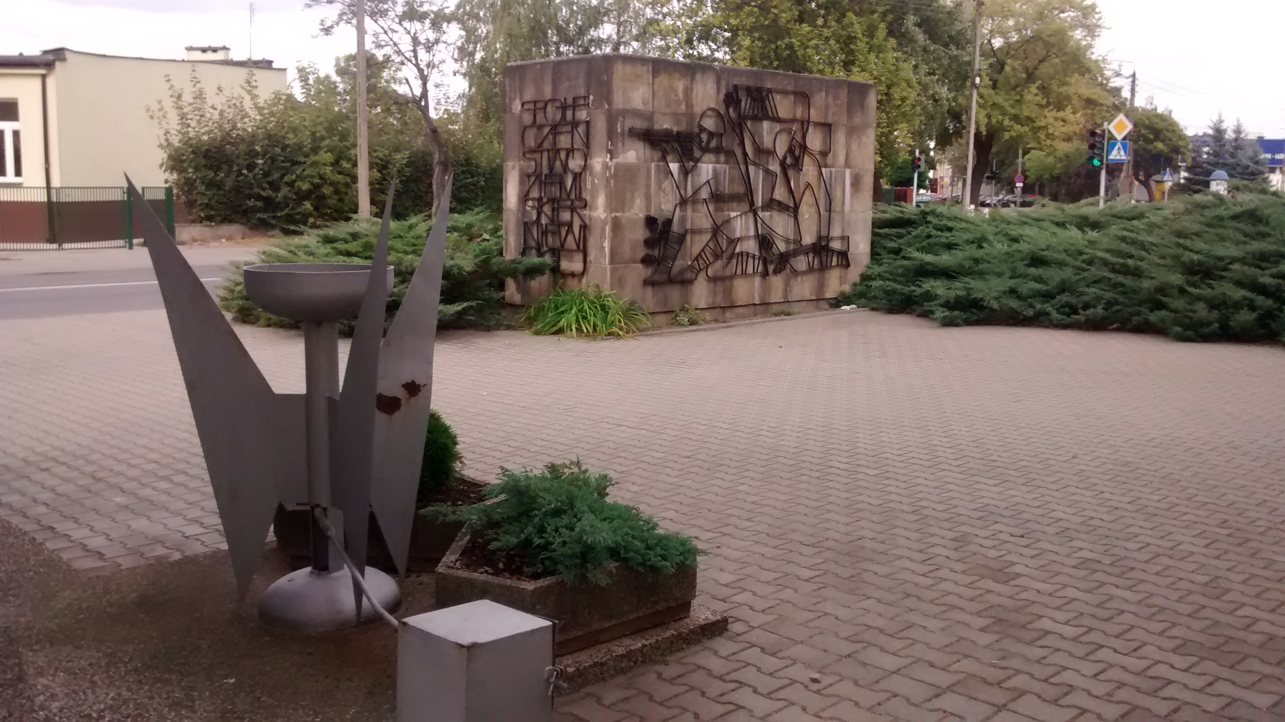 Skwer Inwalidów Wojennych RP